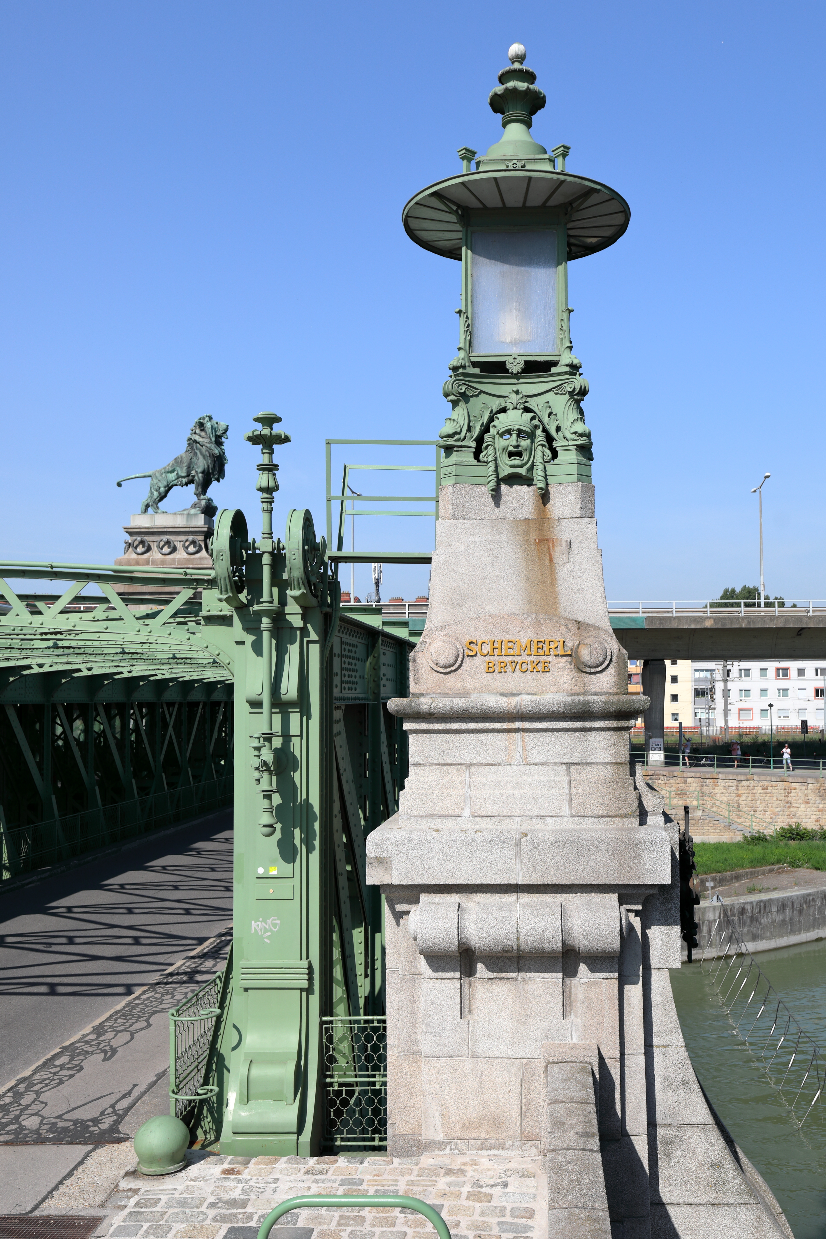 Der östliche Pylon der Schemerlbrücke im 20. Wiener Gemeindebezirk Brigittenau und dahinter die Hochtrasse der Klosterneuburger Straße (B14) im 19. Gemeindebezirk, die von 1981 bis 1983 von der Baufirma H. Rella & Co. errichtet wurde.Die Schemerlbrücke ist nach Joseph Schemerl von Leythenbach benannt und eine doppelte Fachwerkbrücke mit drei Hauptwänden als konstruktiver Teil der Nussdorfer Wehranlage. Der Bau der Wehranlage erfolgte von 1894 bis 1898 nach Plänen von Otto Wagner.